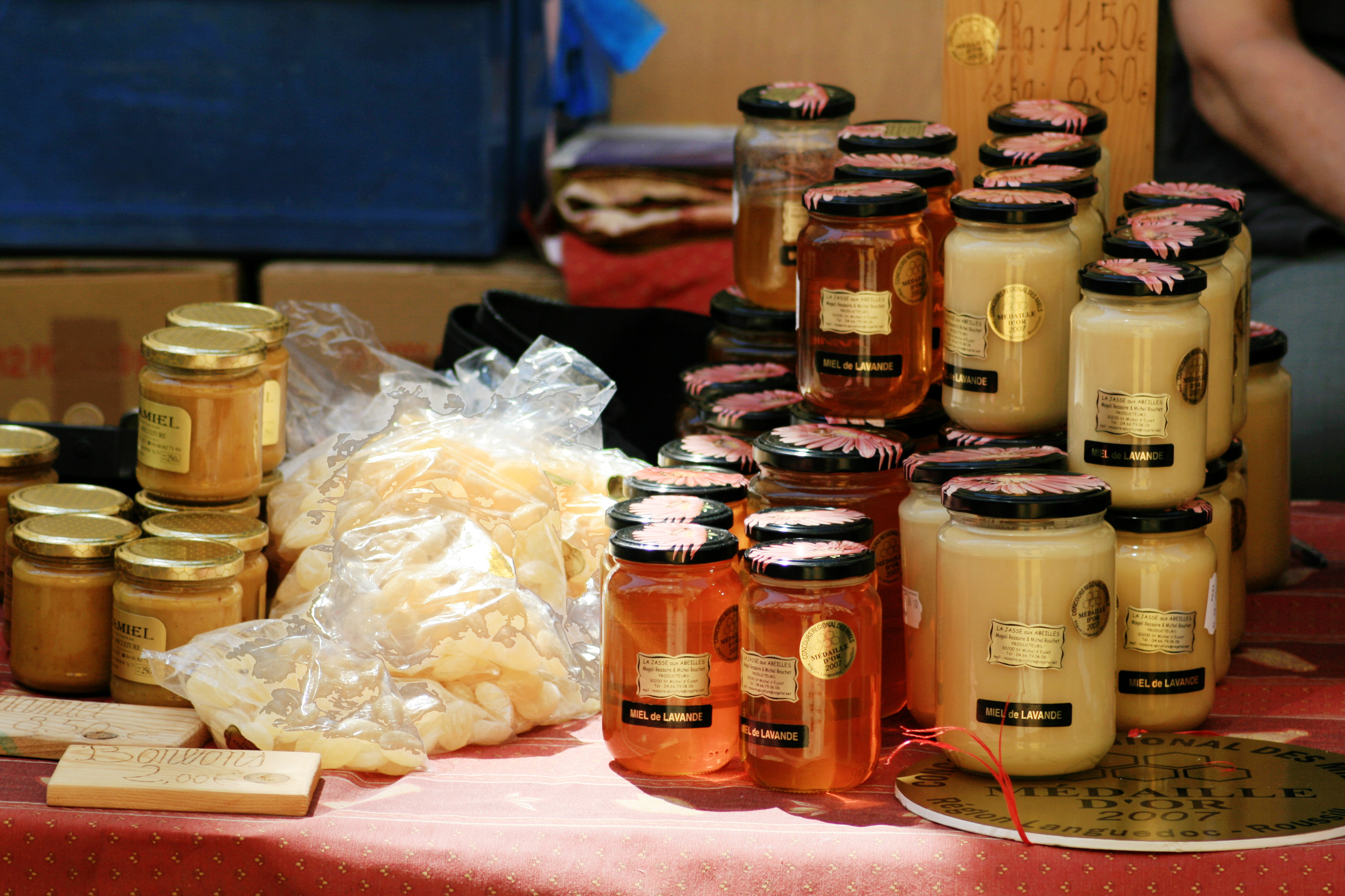 Miel et dérivés au marché d'Orange